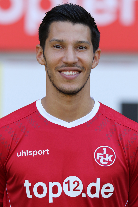 Marcel Correia